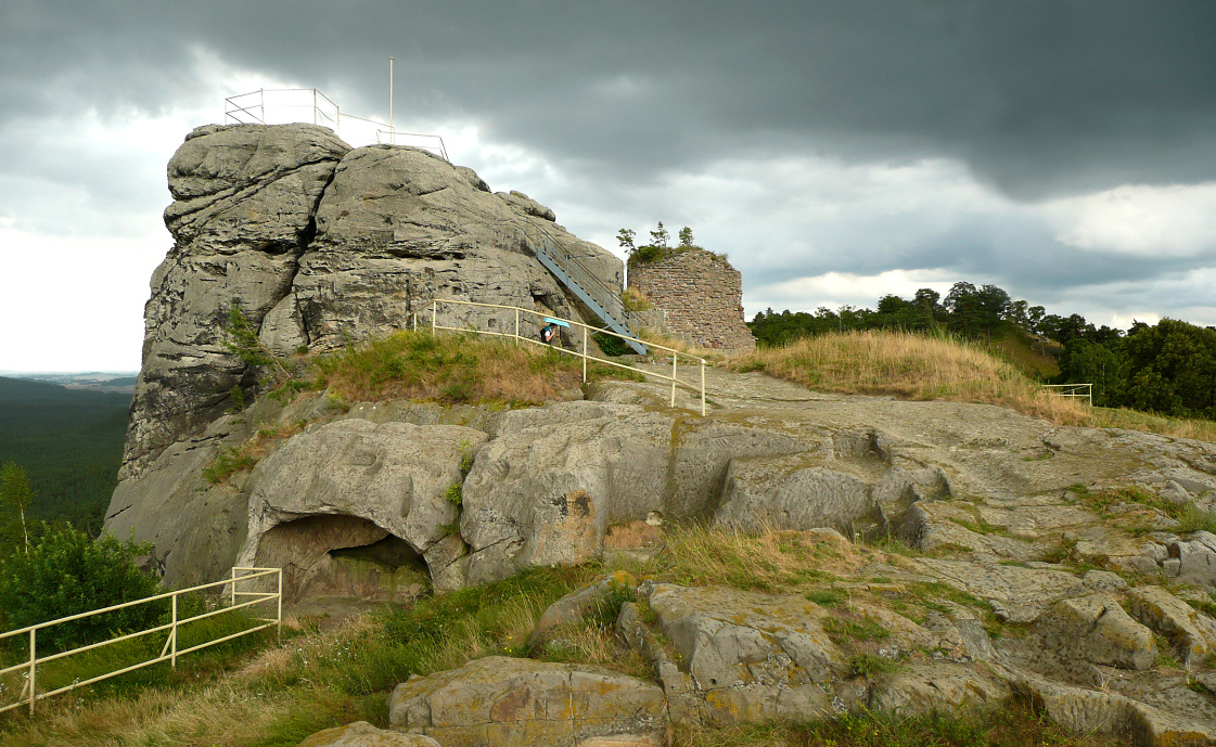 Festung Regenstein